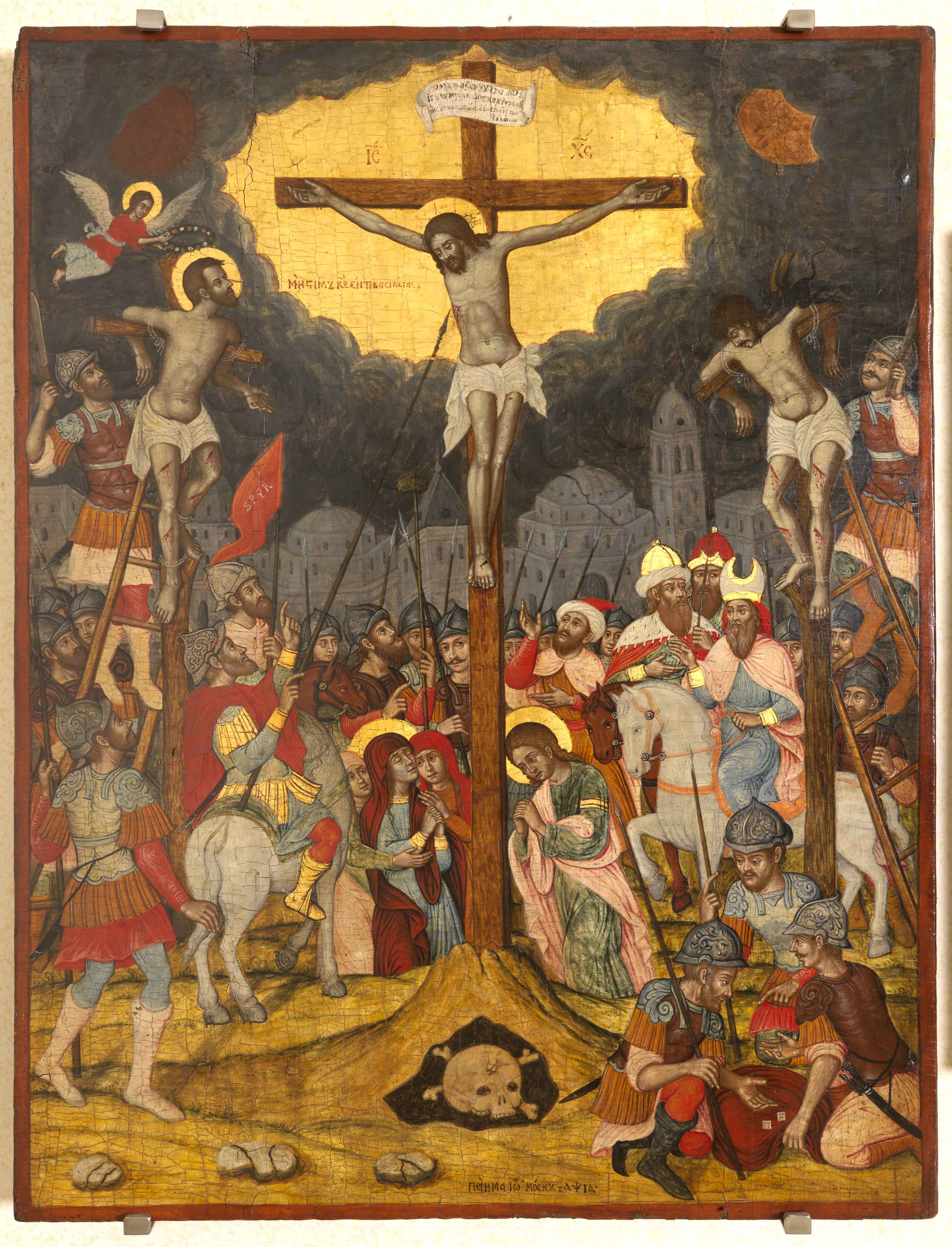 Η Σταύρωση 1711, 70x91εκ. Ιωάννης Μόσκος "ΠΟΙΗΜΑ ΙΩ[ΑΝΝΟΥ] ΜΟΣΚΟΥ ΑΨΙΑ΄ , Μνήστι μου Κύριε εν τη Βασιλεία σου" Είναι μία πολυπρόσωπη σύνθεση που βασίζεται σε δυτικά έργα. Στο μέσον δεσπόζει ο μεγάλος σταυρός με τον Εσταυρωμένο που προβάλλεται σε χρυσό βάθος, ενώ γύρω του απλώνονται μαύρα σύννεφα. Δεξιά και αριστερά από τον σταυρό του Χριστού βρίσκονται οι δύο ληστές, από τους οποίους ο αριστερός που στέφεται από ιπτάμενο άγγελο λέγει προς τον Χριστό: Μνήστι μου Κύριε εν τη Βασιλεία σου. Στη βάση του σταυρού παριστάνονται η λιποθυμία της Παναγίας, η Μαγδαληνή, ο Ιωάννης, άρχοντες, το πλήθος των Εβραίων, πεζοί και έφιπποι στρατιώτες, από τους οποίους ένας λογχίζει την πλευρά του Ιησού, ο διαμερισμός των ιματίων στο πρώτο επίπεδο και στο βάθος βρίσκεται η σκοτεινιασμένη Ιερουσαλήμ.